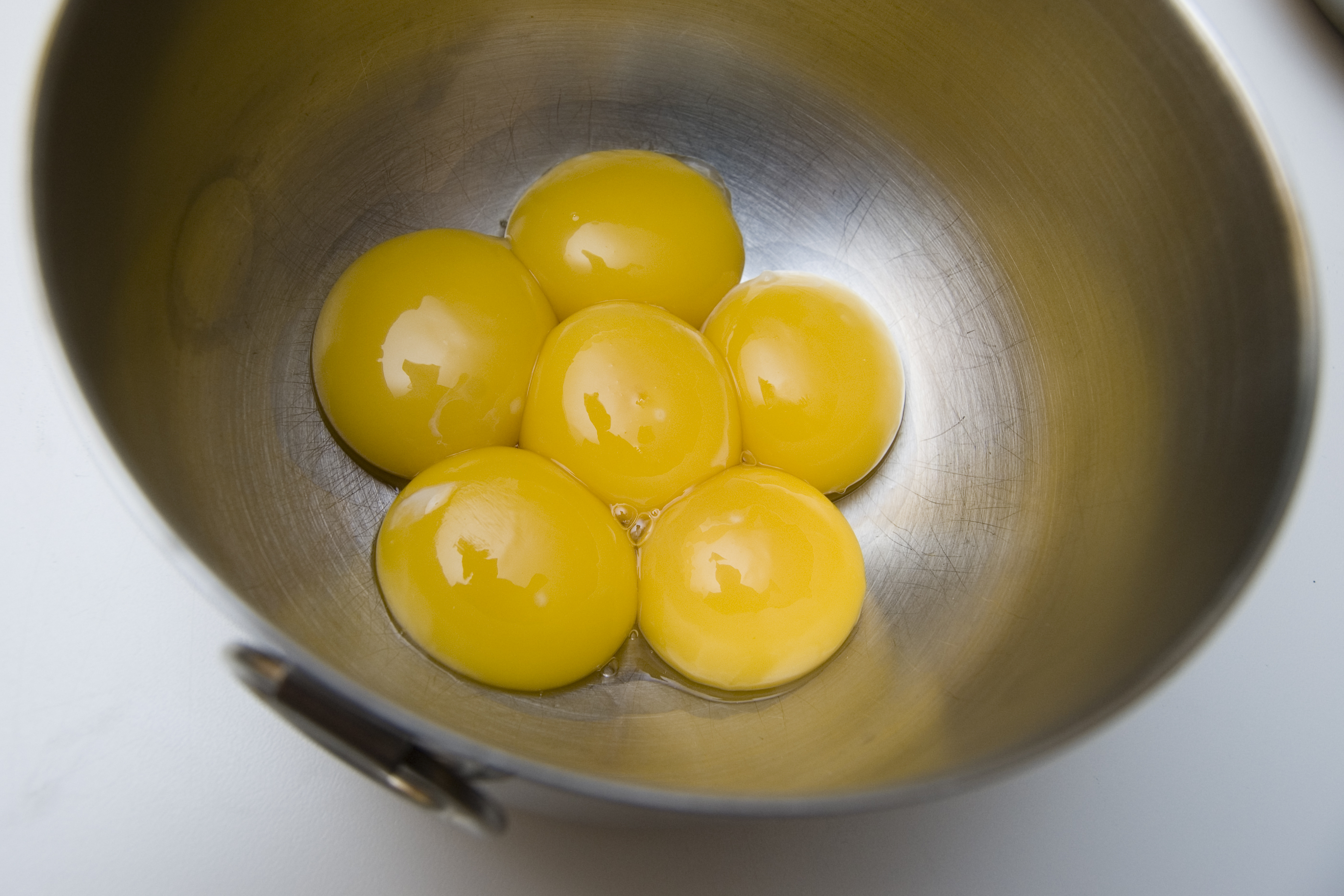 Egg yolks.